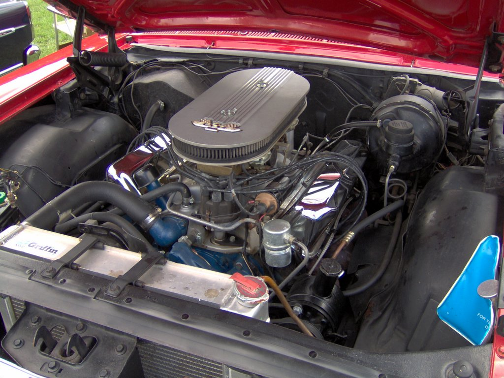 1966 Ford Galaxie XL convertible